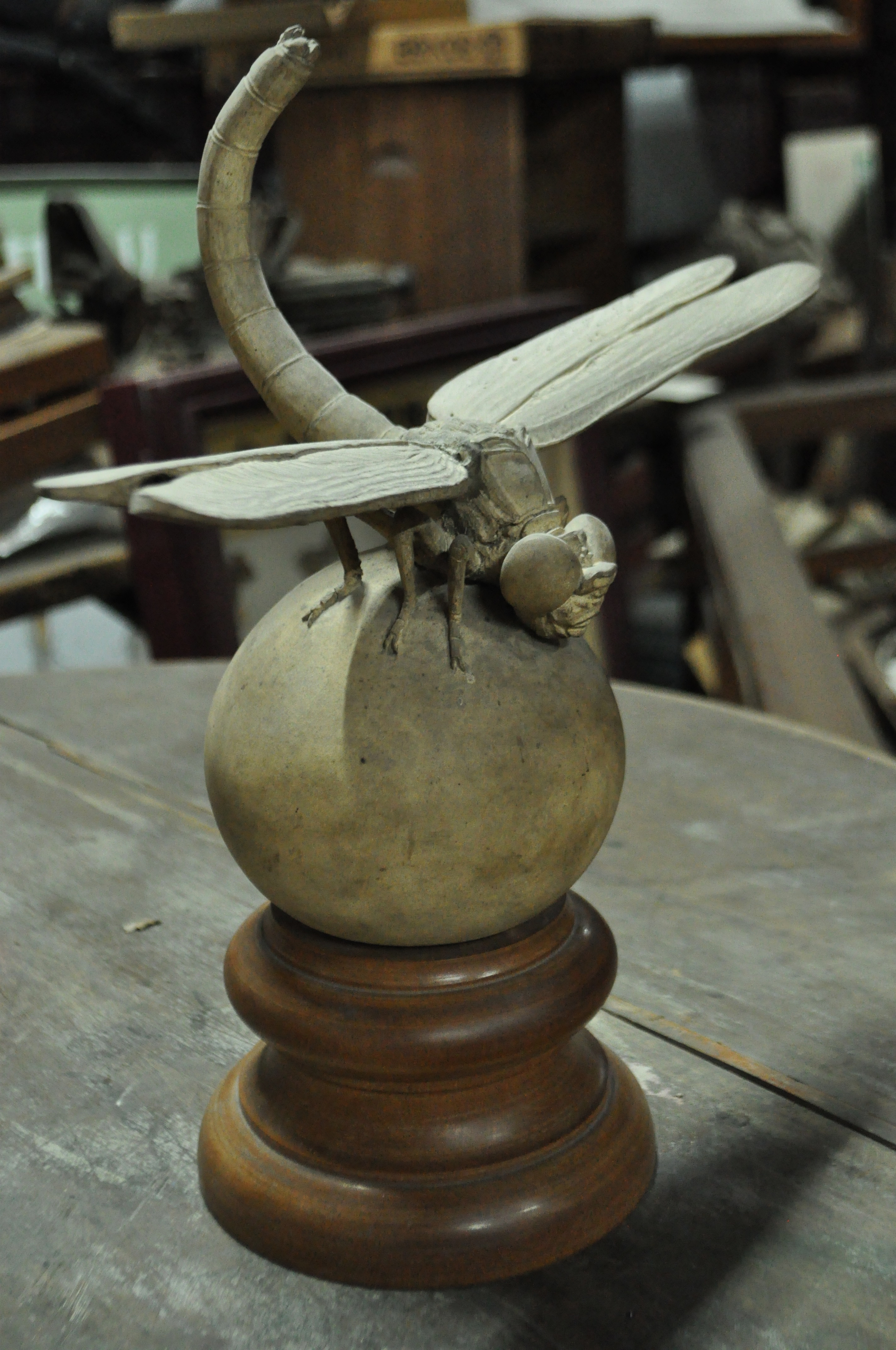 現名和昆虫博物館館長・名和哲夫氏によれば「ムカシヤンマ」をモデルにしている。元は名和博物昆虫研究所の玄関庇の上に取り付けられていた。「ムカシヤンマ」はかつて「ギフヤマトンボ｣と呼ばれており、世界でも日本にしか分布していない種で、ムカシヤンマを最初に採集して記載されるきっかけを作ったイギリス人のプライヤーは、名和靖がギフチョウを発見したときに，「日本ではまだ確認されていない種」と太鼓判を押した人物で，靖ともいっしょに昆虫採集に出かけるなど交流のあった人物であった。その造形は中胸背の特徴を捉えて正確であり、久田と名和靖との間で相当綿密な打ち合わせがあったことを伺わせ、久田吉之助の卓越した技術と真摯な取り組みを今に伝えている